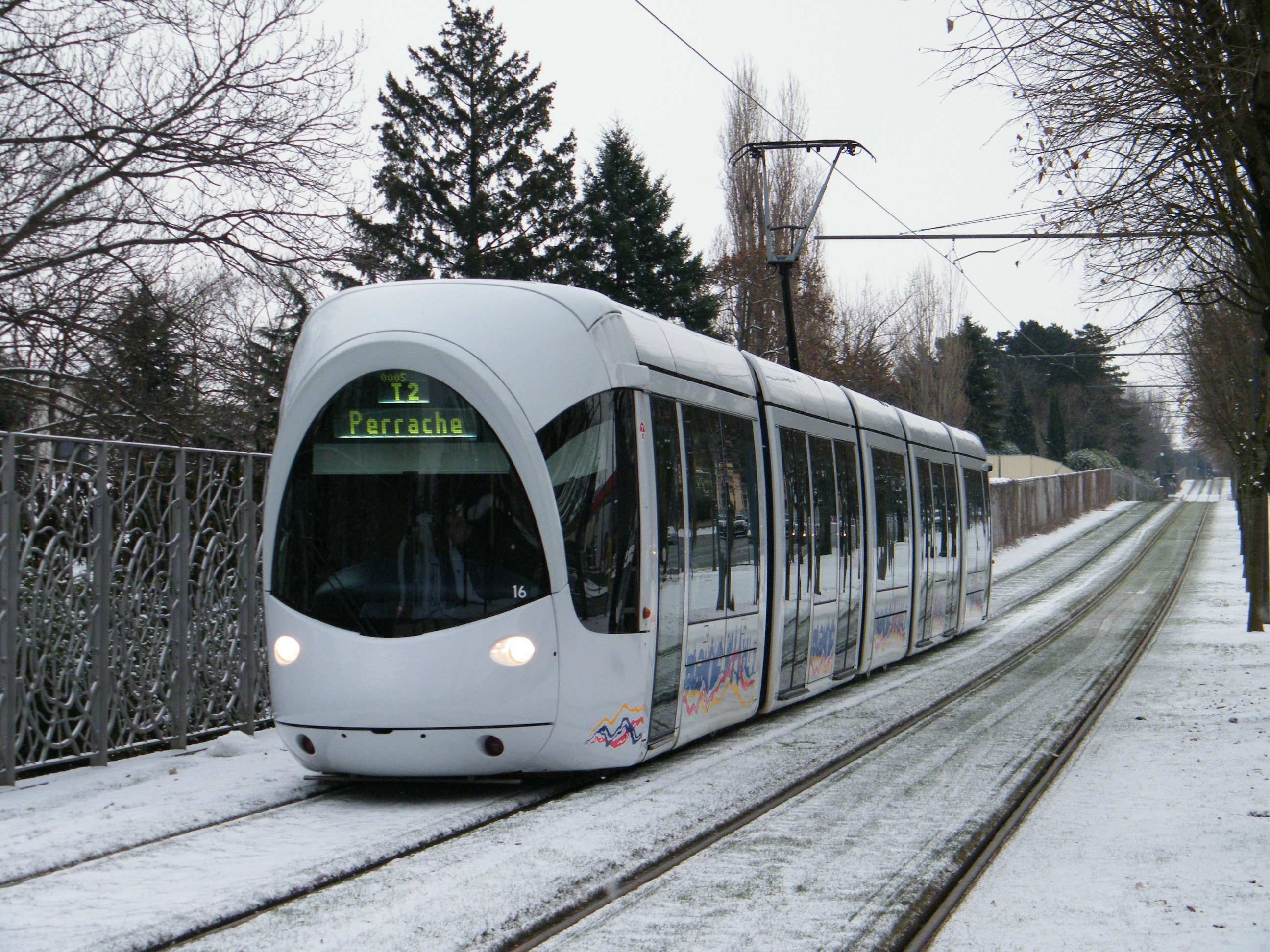 Avec un temps neigeux, cette rame en provenance de Saint-Priest Bel-Air approche en station de Vinatier.